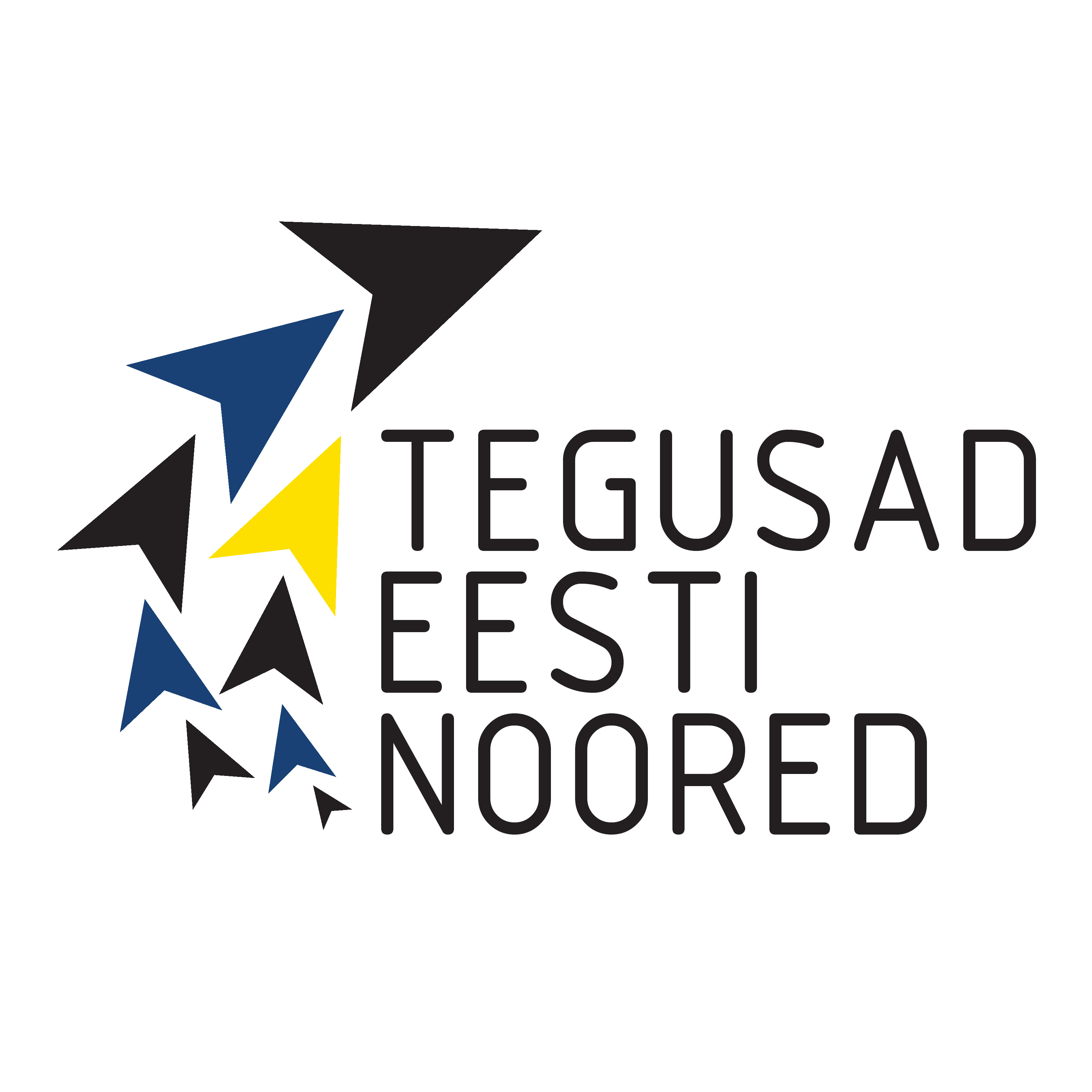 Noorteorganisatsiooni logo